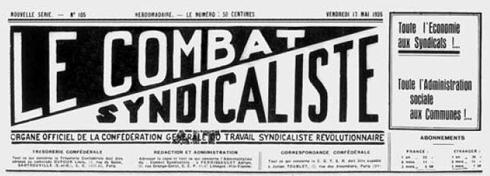 Le Combat syndicaliste, journal de la Confédération générale du travail - Syndicaliste révolutionnaire de 1926 à 1939. En-tête du numéro 105 du 17 mai 1935